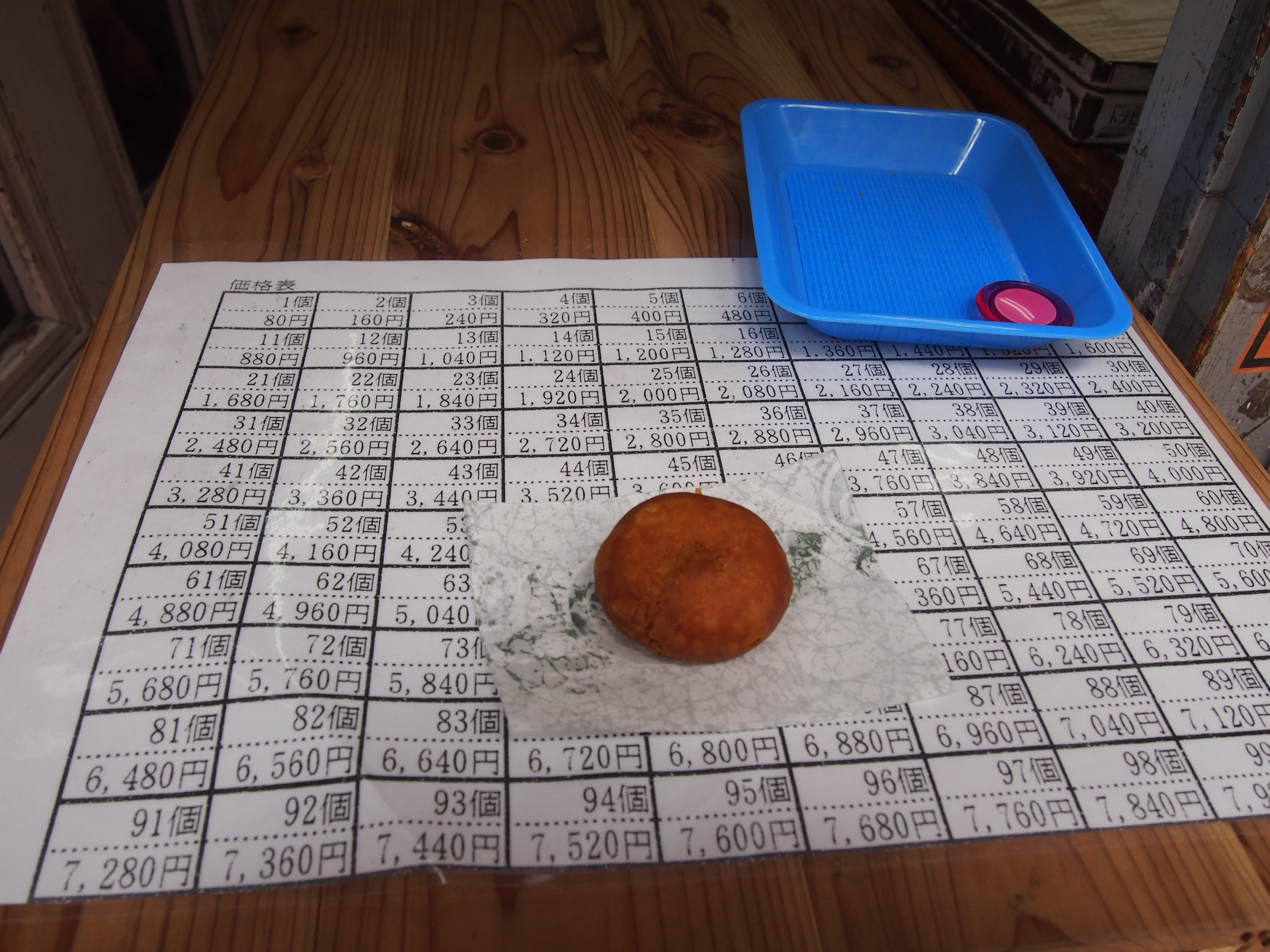 福住（フライケーキ）